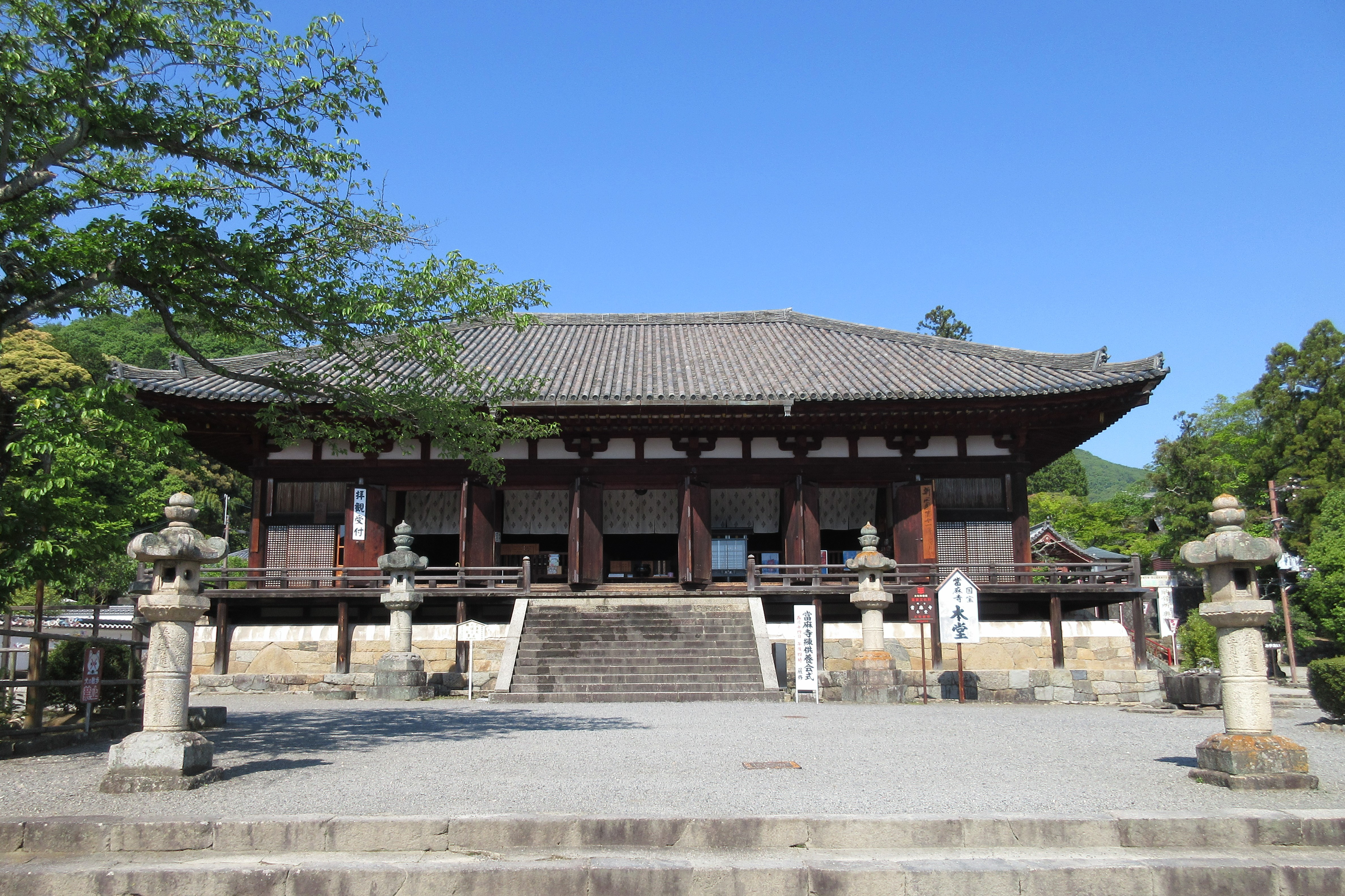 當麻寺本堂